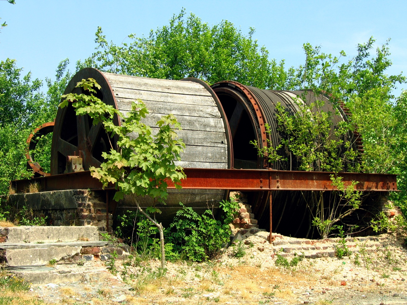 Ancien treuil sur une friche d'ardoisière à Rimogne (08)